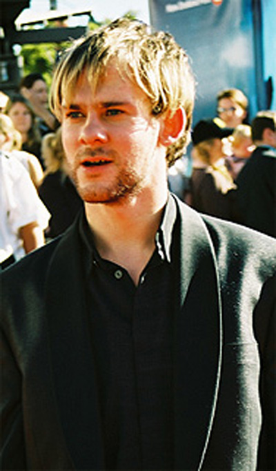 Dominic Monaghan bei der Weltpremiere des dritten Teils des Herrn der Ringe in Wellington (Neuseeland).